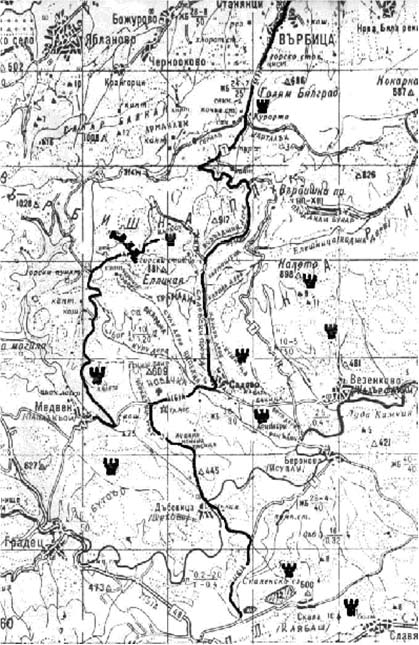 Карта на района;© 2001 Иван Рандев